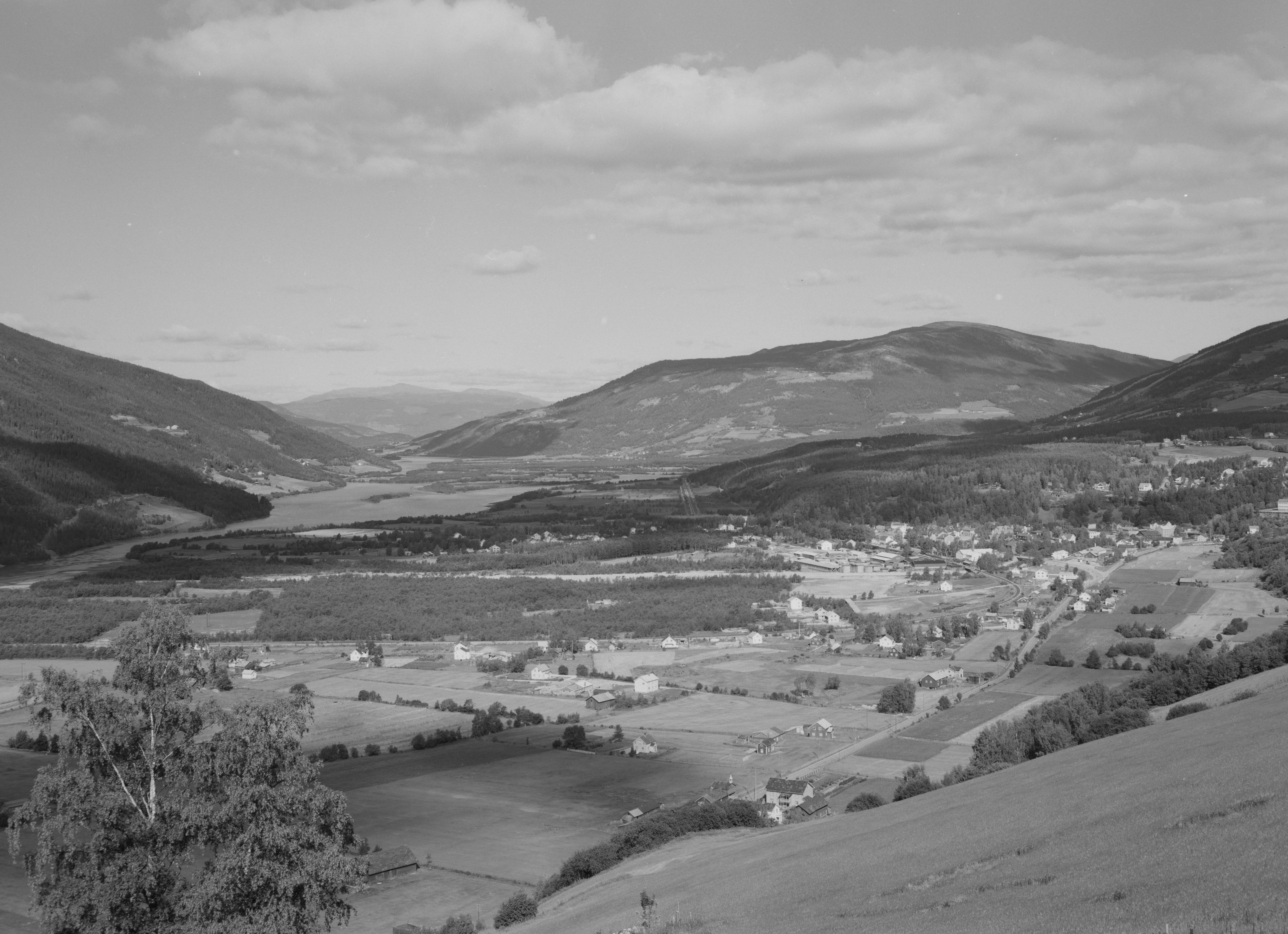 Bildet er hentet fra Nasjonalbibliotekets bildesamling Gudbrandsdalen,Ringebu, Ringebu, Oppland